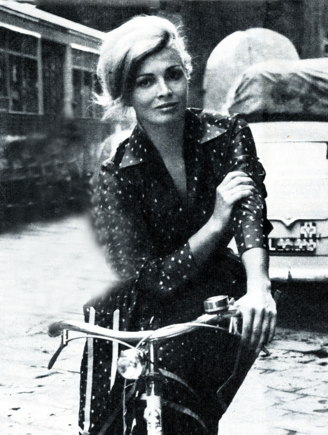 photo from Settimana Radio Tv' (1959)